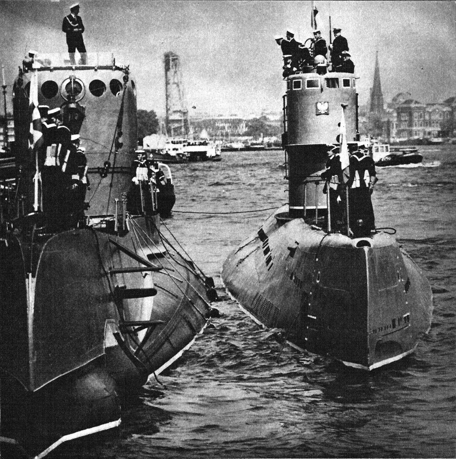 Okręty podwodne ORP "Sęp" i ORP "Bielik" z wizytą w Rostocku w 1968 roku